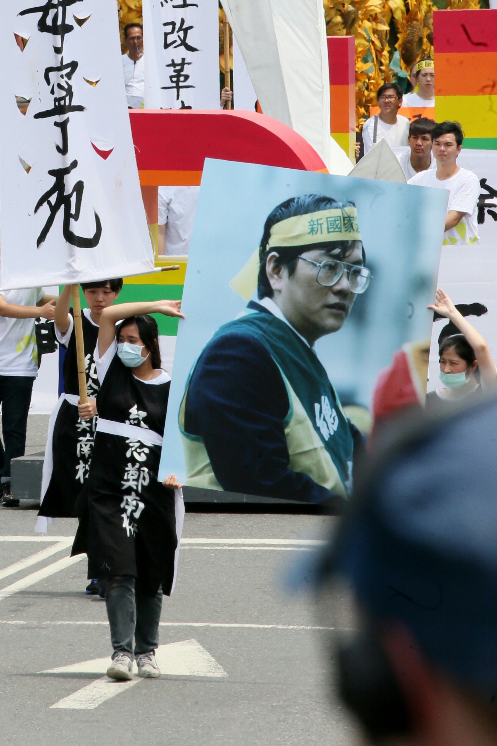 就職典禮鄭南榕肖像經過總統府